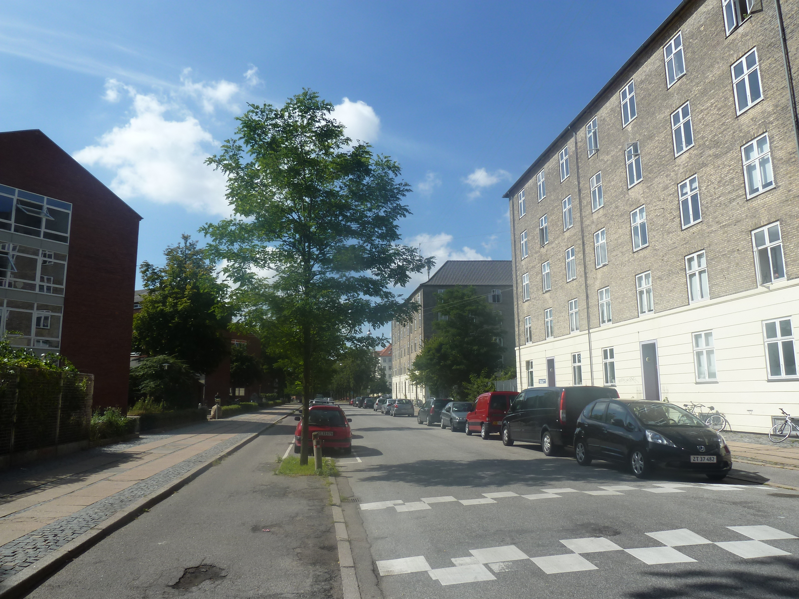 The street Sjællandsgade in Nørrebro in Copenhagen.